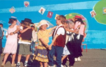 Kermesse d’une école primaire en France